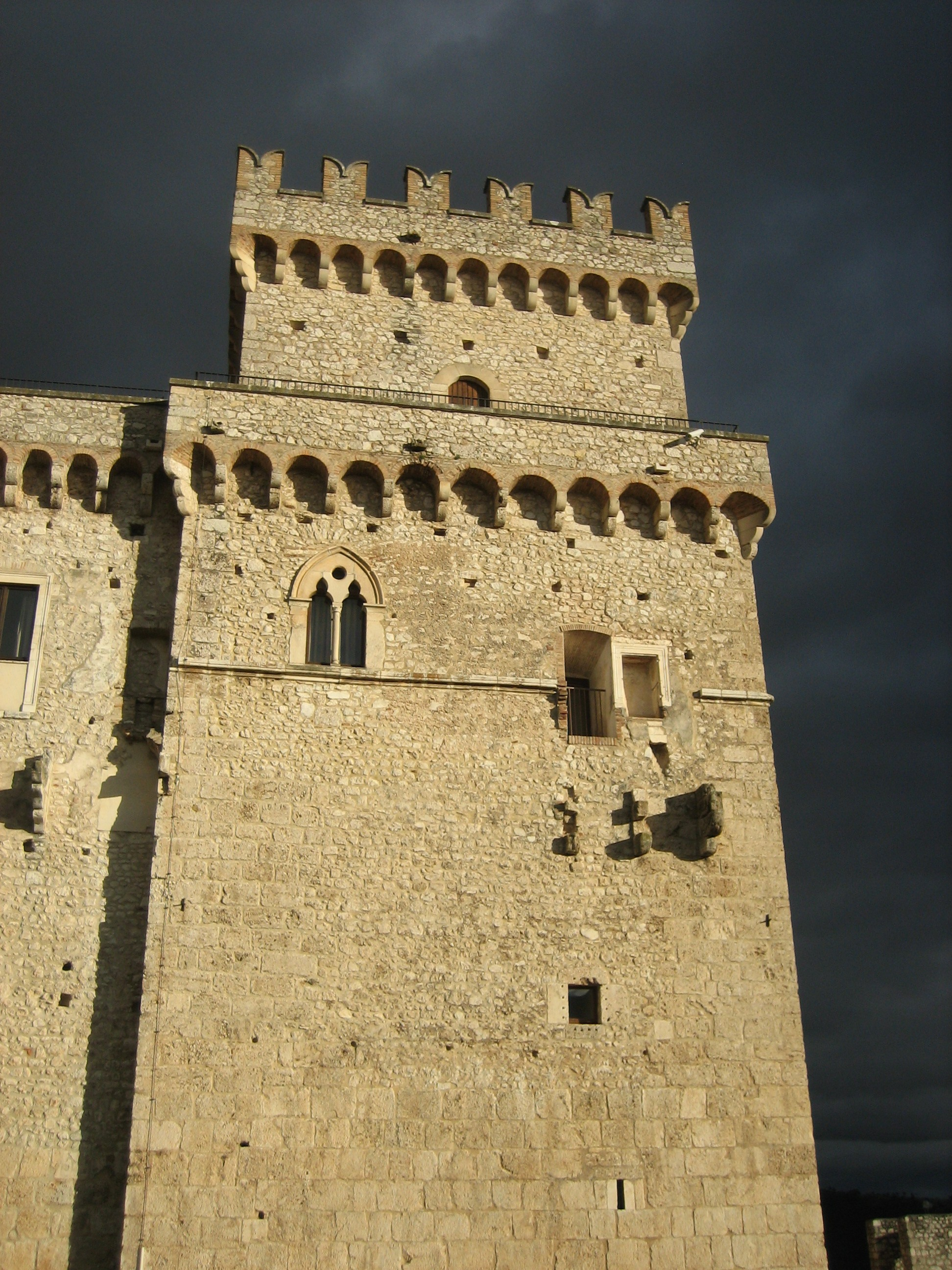 Autore: Claro48 Fonte: my own production Descrizione: Castello Piccolomini di Celano, provincia de L'Aquila in Abruzzo (Italia)